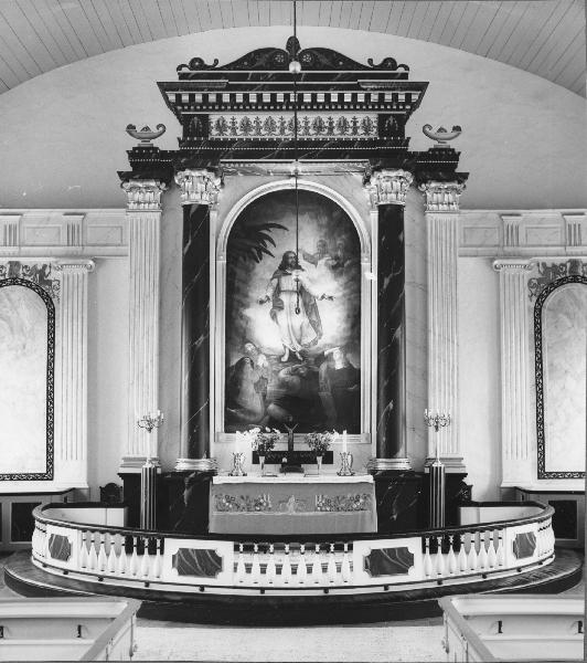 Detalj av altarvägg. Under restaureringen. Kategori: (05) Altarprydnader, detaljerDetalj av altarvägg. Under restaureringen.